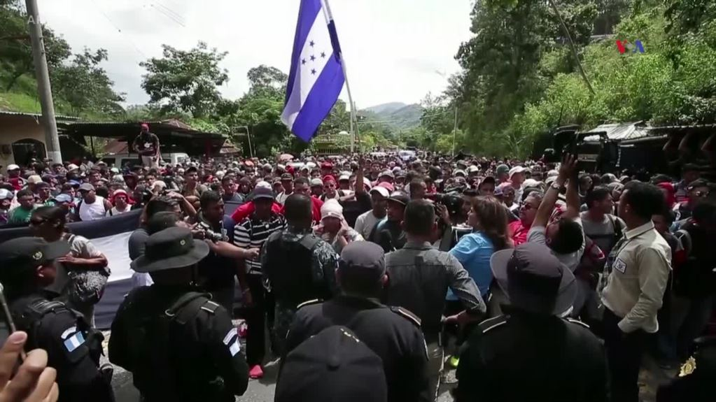 Salvadoreños en la caravana de migrantes rumbo a Estados Unidos